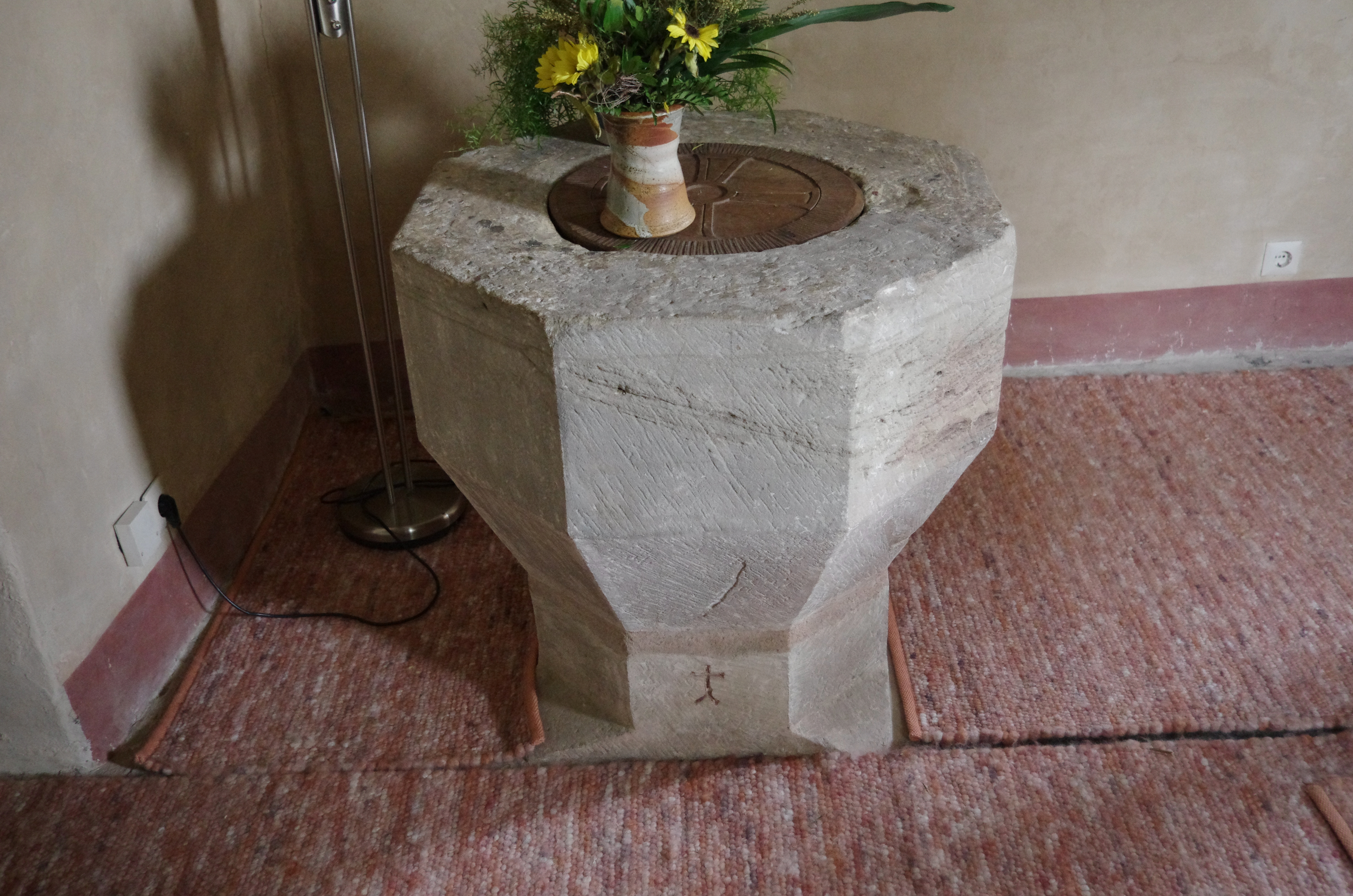 Bad Wildungen, Ortsteil Frebershausen in Hessen. Der Taufstein in der Kirche.